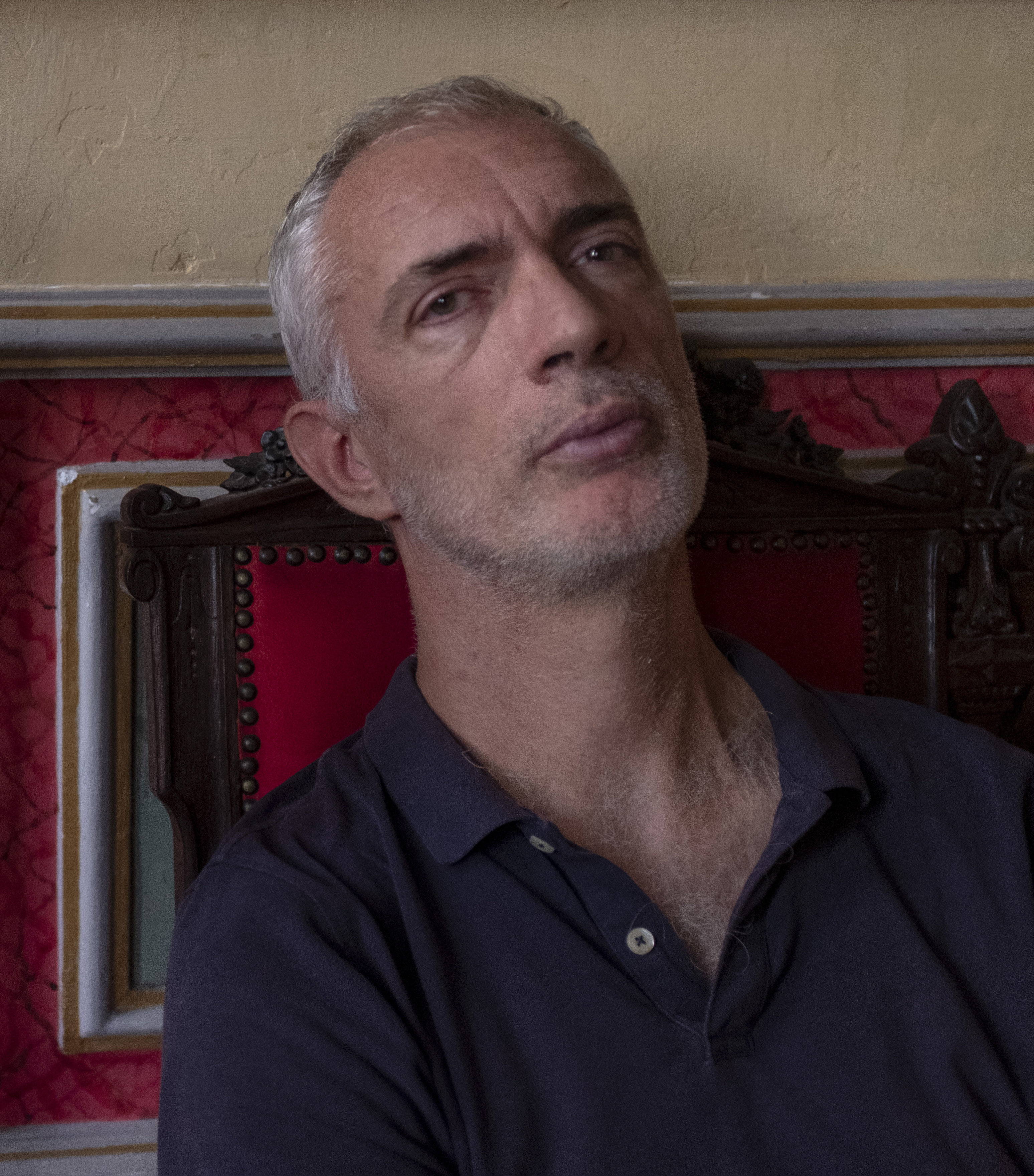 Portrait réalisé dans un restaurant de Salvador de Bahia